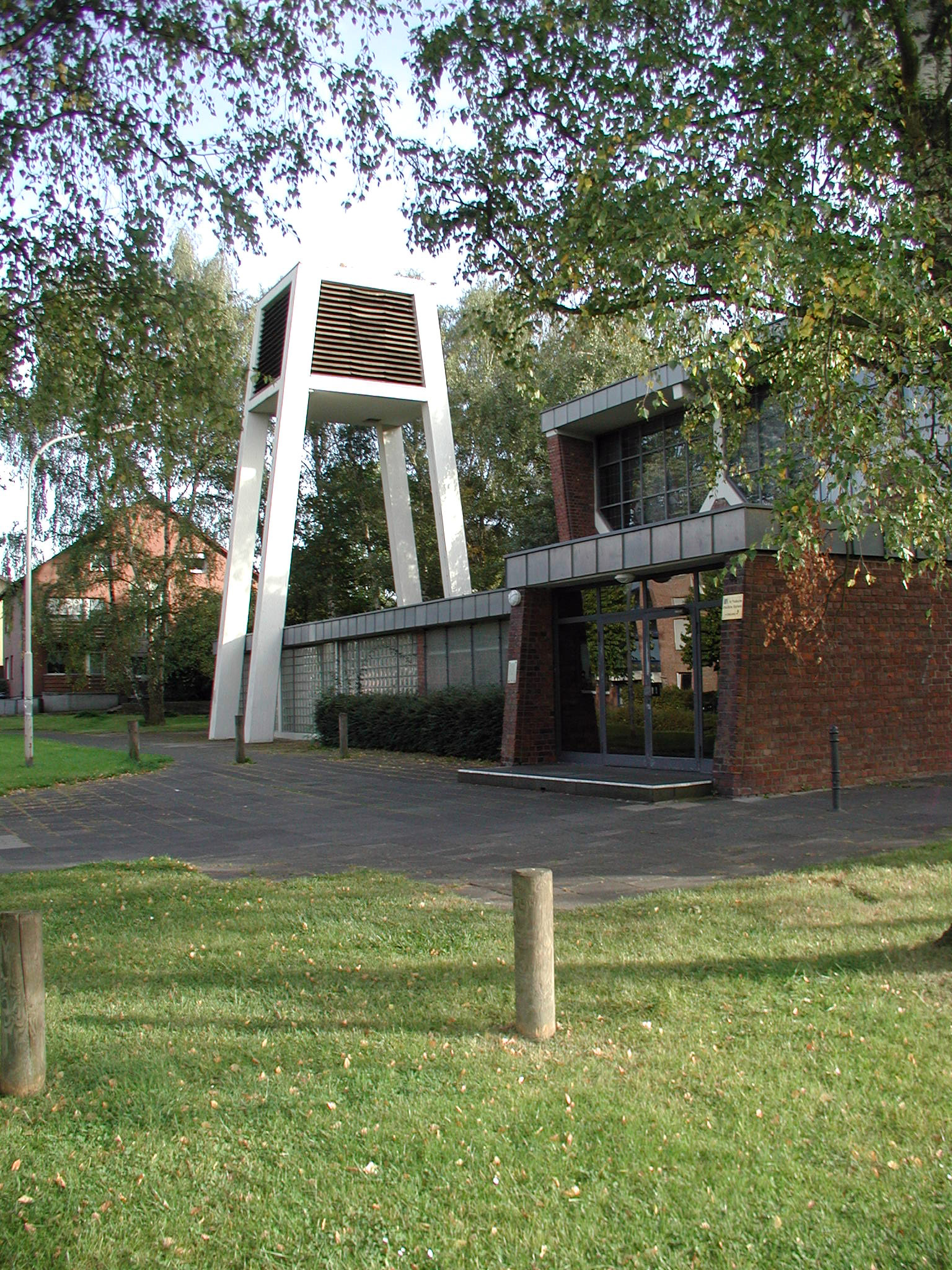 Katholische Pfarrkirche St. Maria am Brunnen, Hürth-Alstädten-Burbach